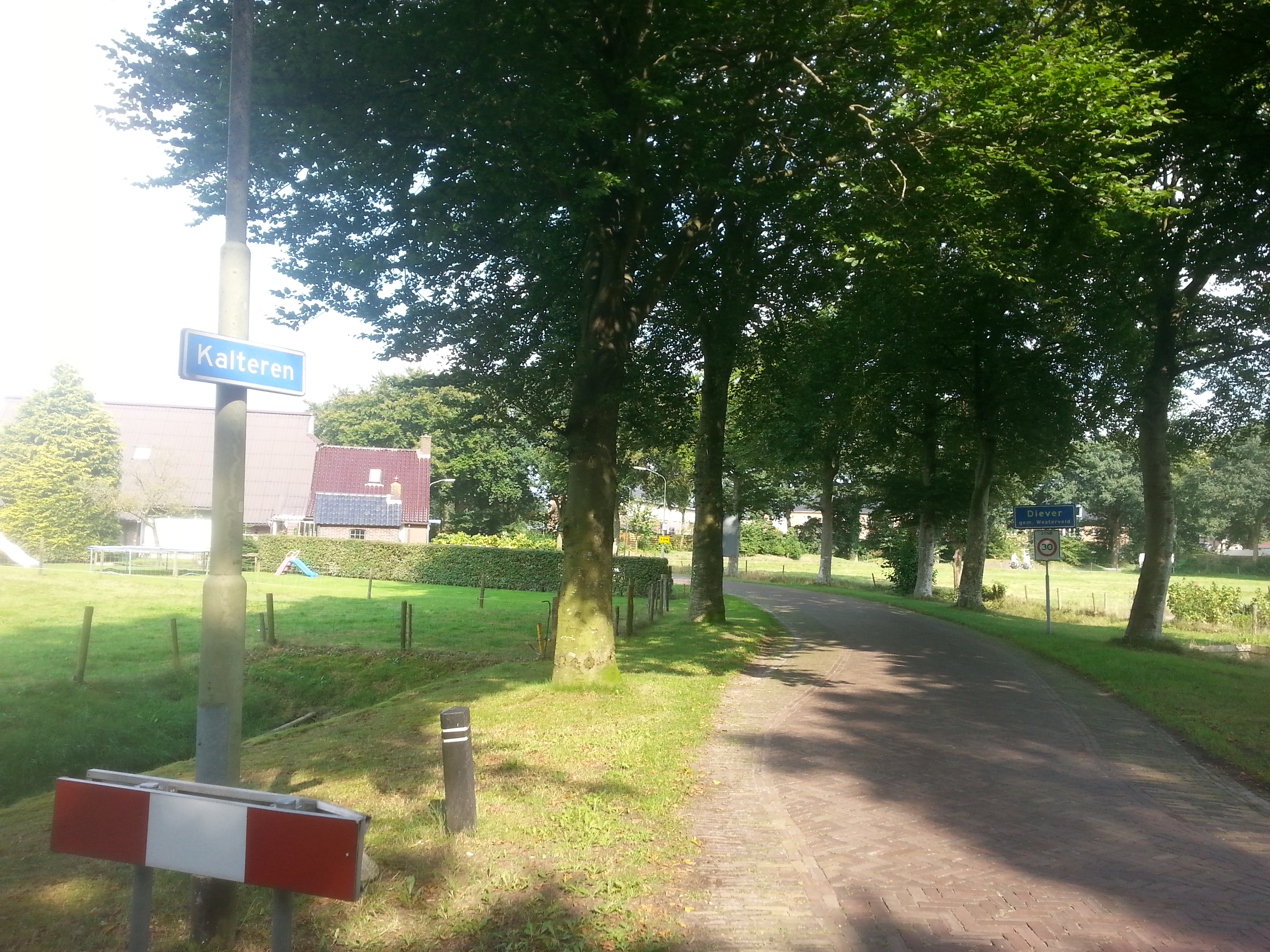 Kalteren tijdens een fietstocht.